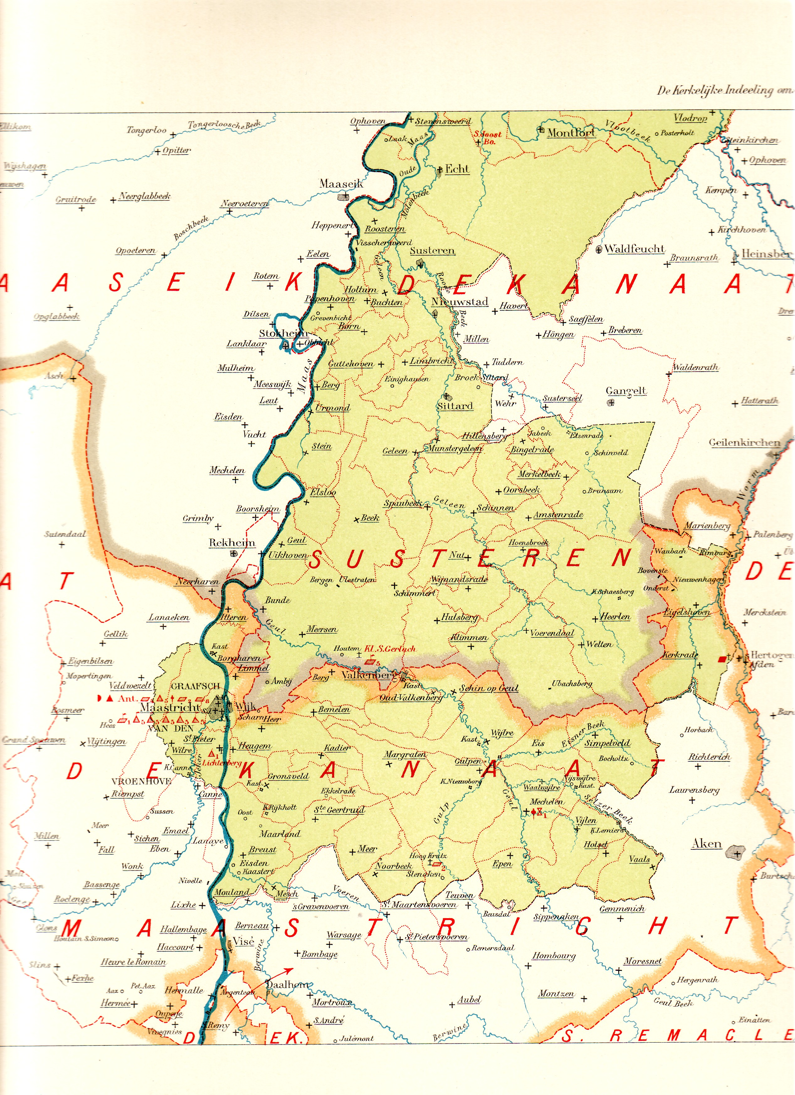 Eigen scan van kaart uit Geschiedkundige atlas van Nederland, uitgegeven in 1923 door Martinus Nijhoff in Den Haag.